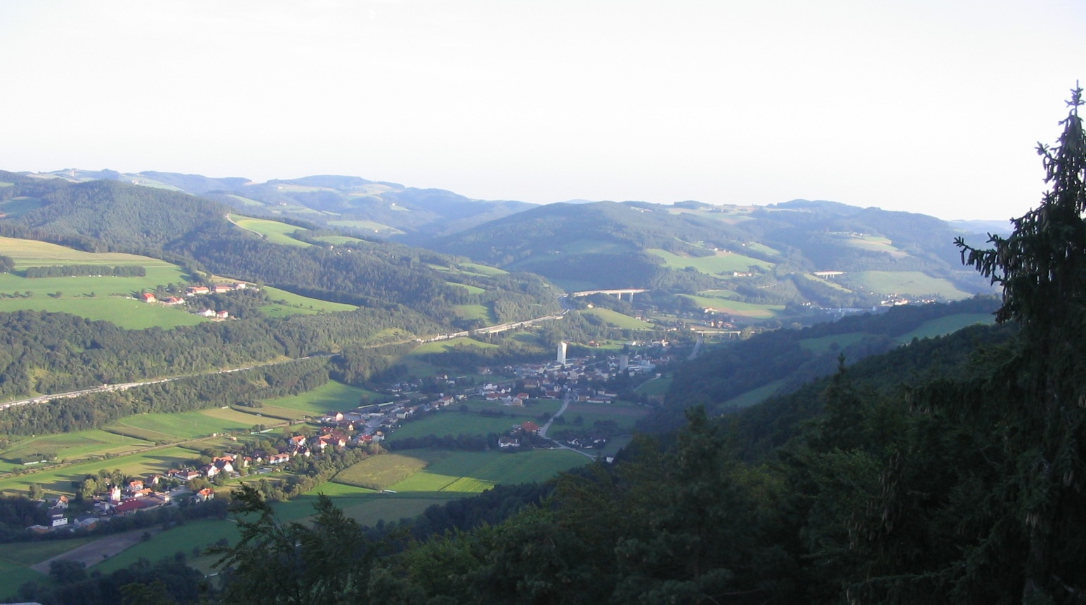 Grimmenstein Panorama over the Bucklige Welt